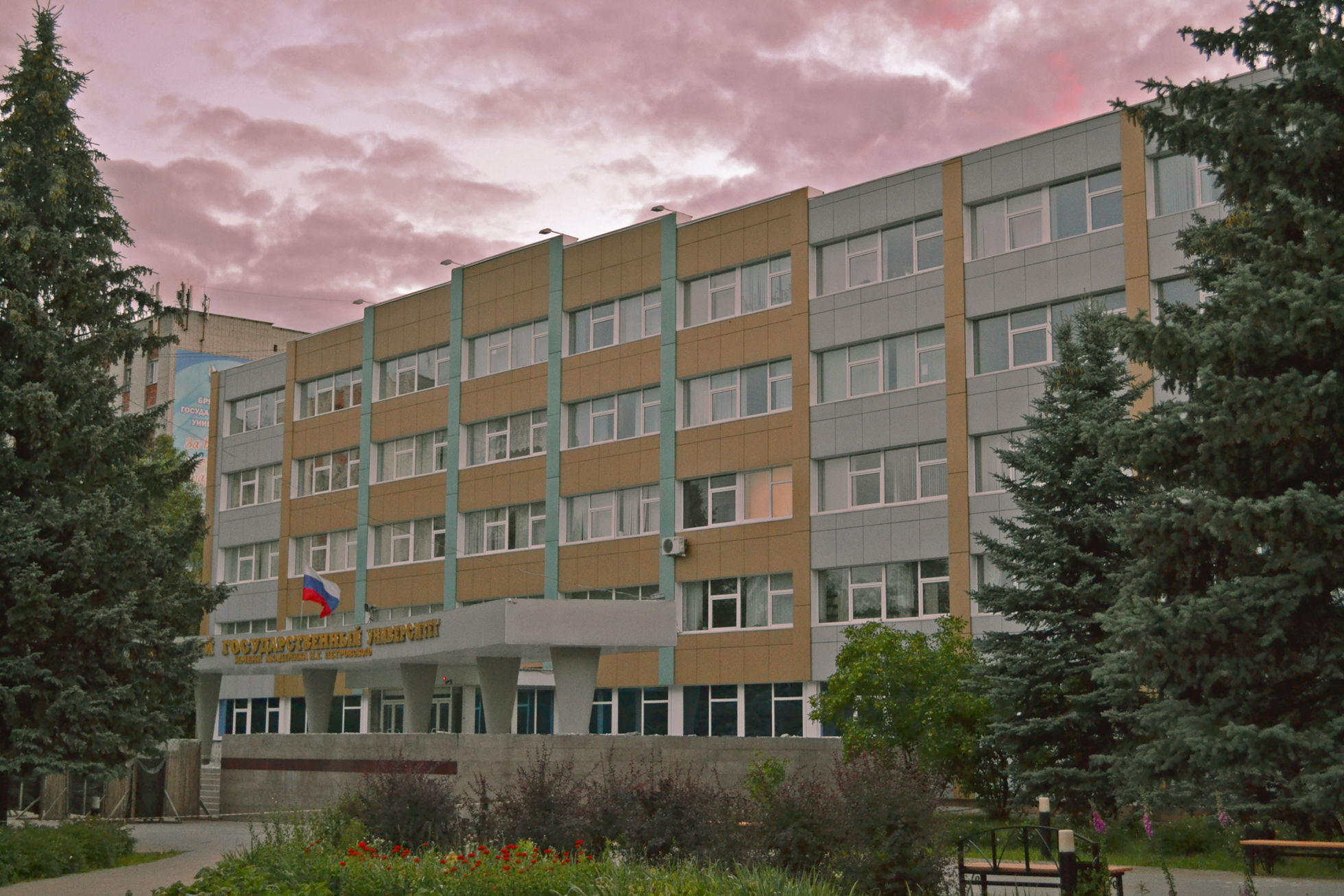 Брянский государственный университет имени академика Петровского